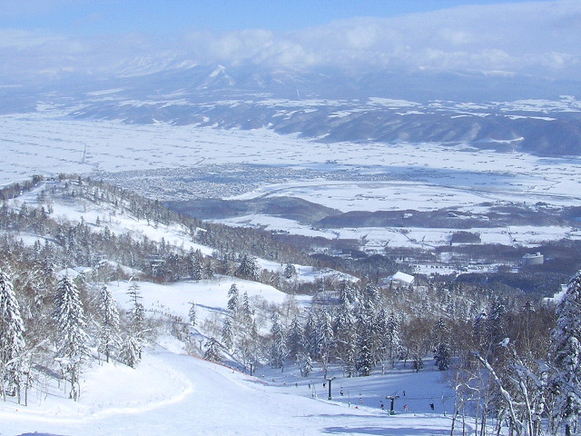 富良野スキー場 (北海道富良野市) Furano Snow Resort (Hokkaido, JAPAN)